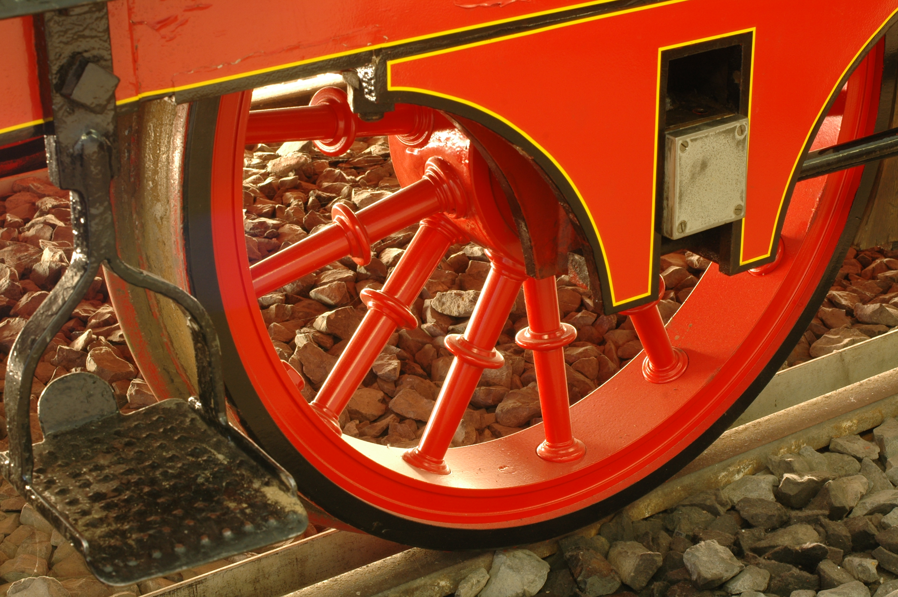 ersten Lokomotive in Deutschland (Adler) im Verkehrsmuseum in Nürnberg